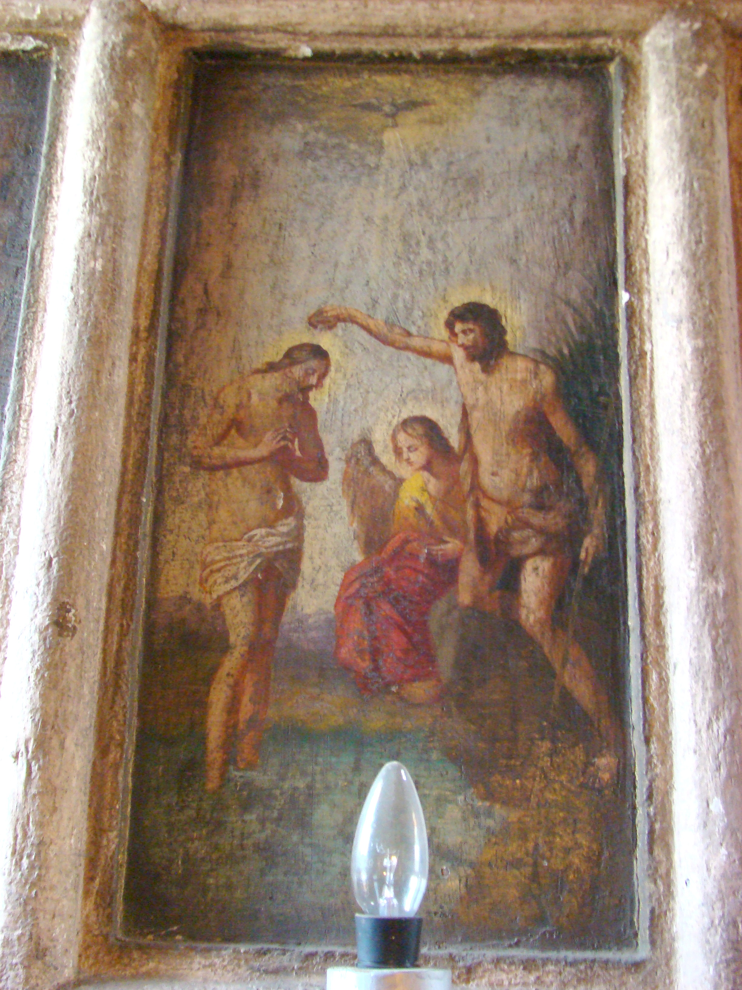 Biserica „Sfântul Prooroc Ilie”, sat Peșteana; comuna Densuș